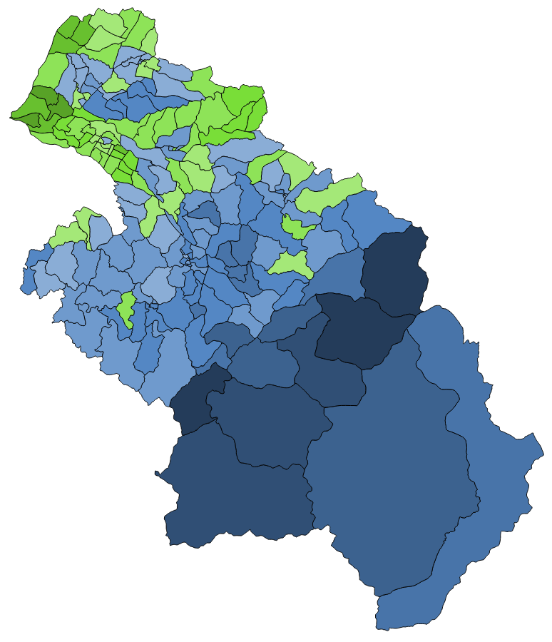 中文（台灣）: 顏色對照表